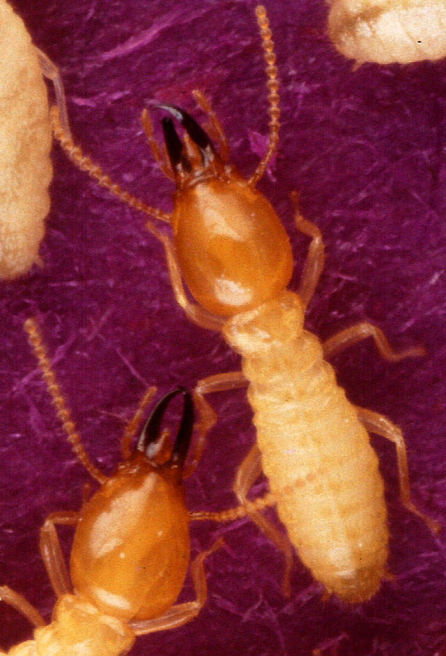 Coptotermes formosanus shiraki; Formosan subterranean termites(Termite), イエシロアリ(シロアリ)